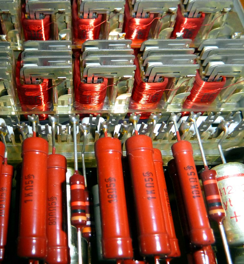 ESK Relais Einschub Amtsübertragung aus der Nebenstellenanlage ESK 400E